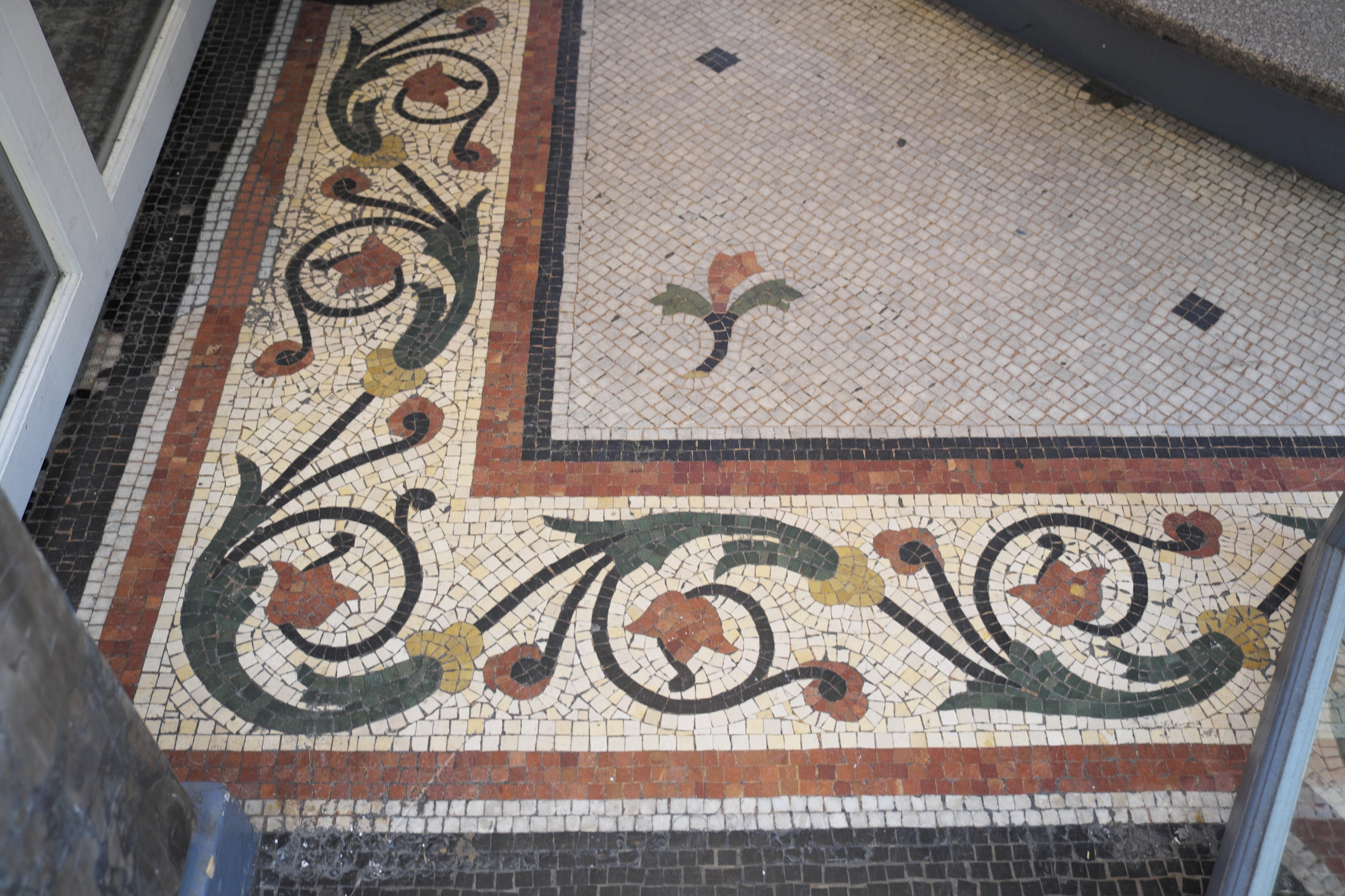 Le Salon des Miroirs in der Passage Jouffroy im 9. Arrondissement in Paris (Île-de-France/Frankreich)